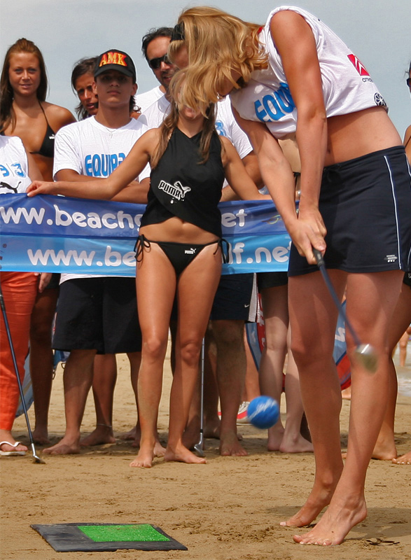 Giocatrice durante l'evento Beach Golf 2006 a Pescara